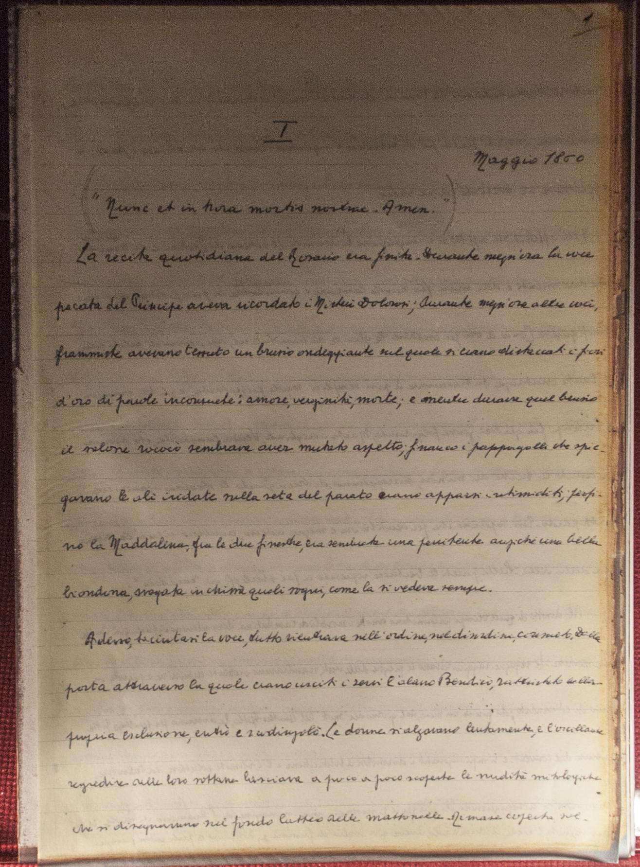 Incipit Gattopardo